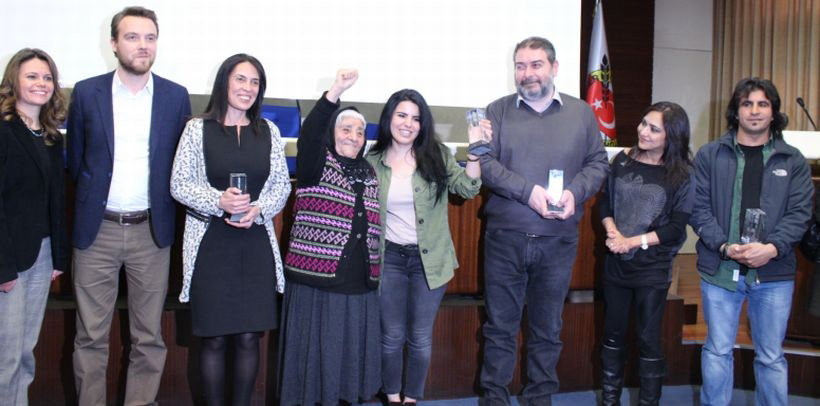 18. Metin Göktepe Gazetecilik Ödüllerini kazananlar, Fadime Göktepe ile birlikte. Fotoğraf:Ezgi Görgü/Evrensel Gazetesi